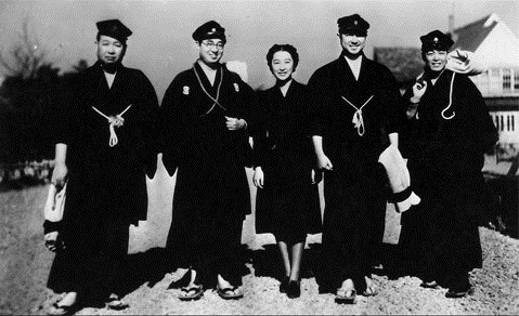 『居候は高鼾』、1939年、スチル写真